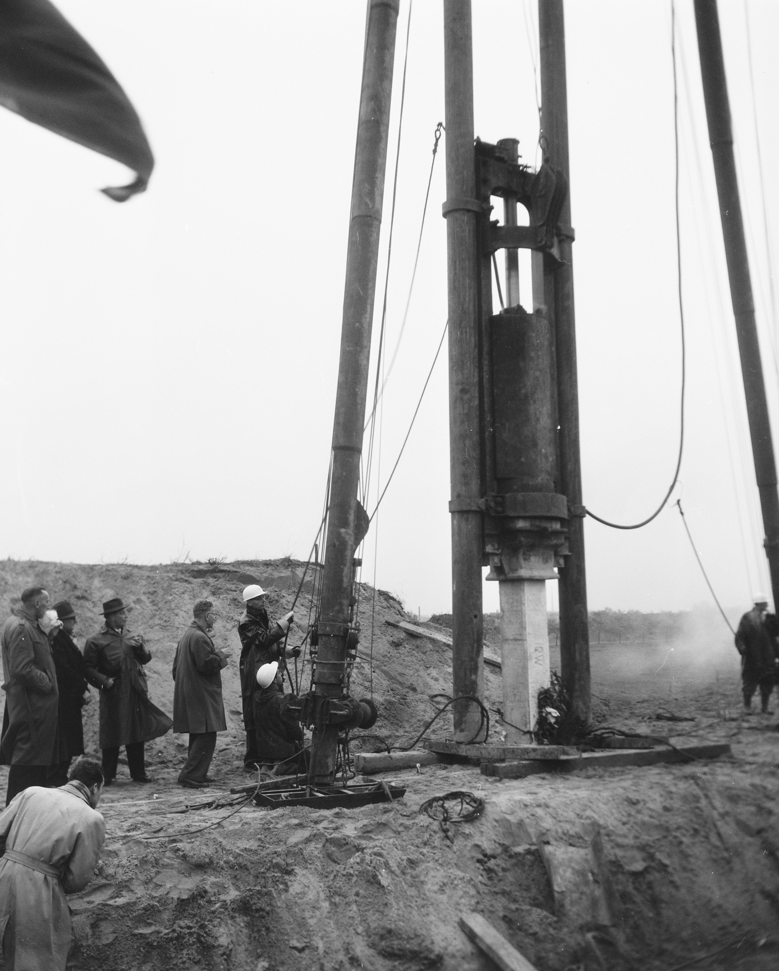 Collectie / Archief : Fotocollectie Anefo Reportage / Serie : [ onbekend ] Beschrijving : Eerste paal voor viaduct van Rijksweg 20 te Schiedam Datum : 26 november 1957 Locatie : Schiedam, Zuid-Holland Trefwoorden : viaducten Fotograaf : Pot, Harry / Anefo Auteursrechthebbende : Nationaal Archief Materiaalsoort : Negatief (zwart/wit) Nummer archiefinventaris : bekijk toegang 2.24.01.04 Bestanddeelnummer : 909-1451